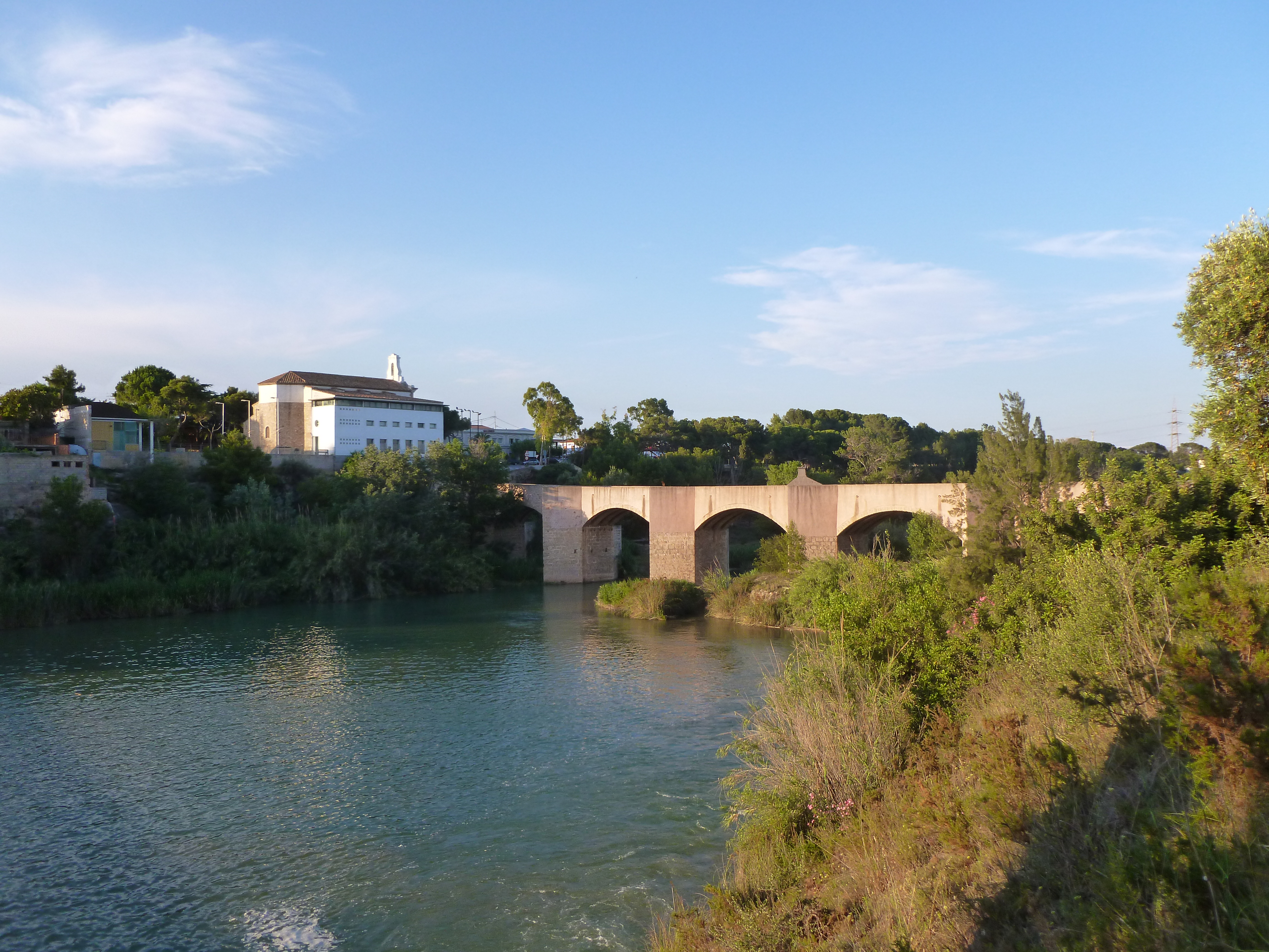 Pont de Santa Quitèria